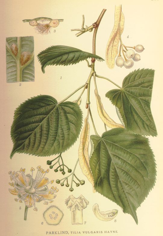 Parklind (Tilia x vulgaris)